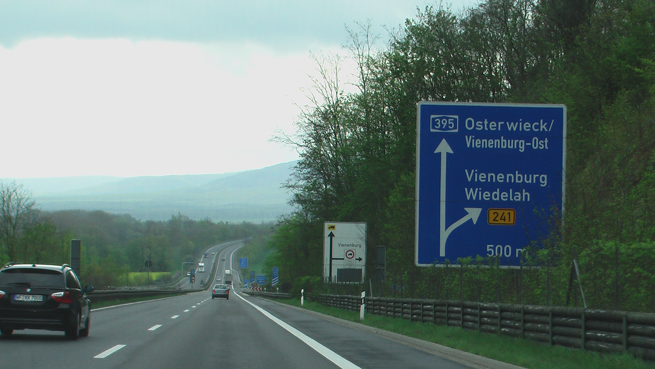 De A395 bij Vienenburg, in de richting van Bad Harzburg.